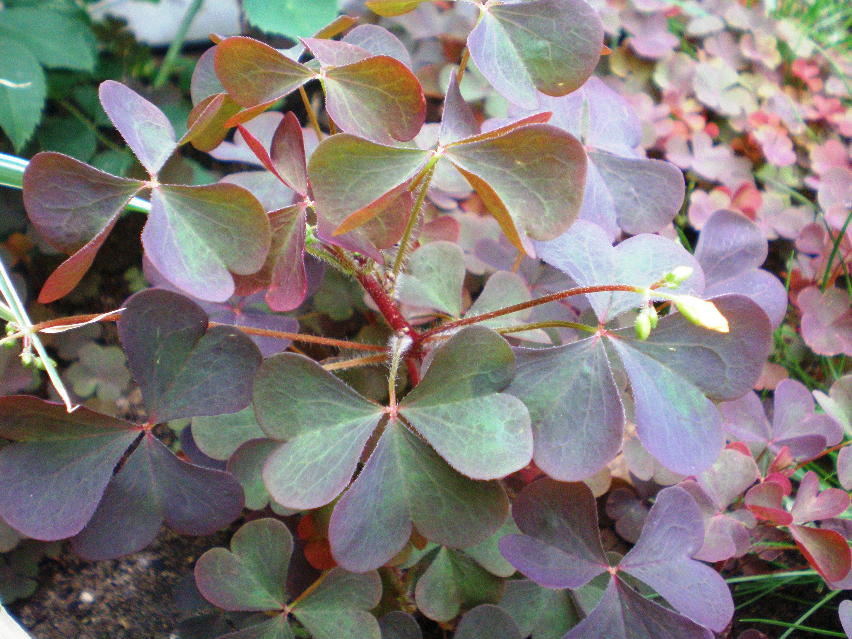 Oxalis stricta decorative plant.